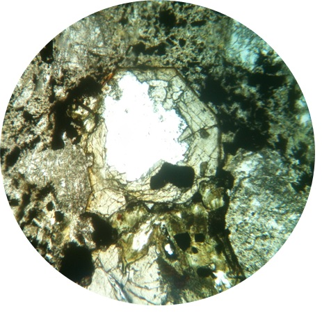 Piroxeno alterado en roca ígnea básica